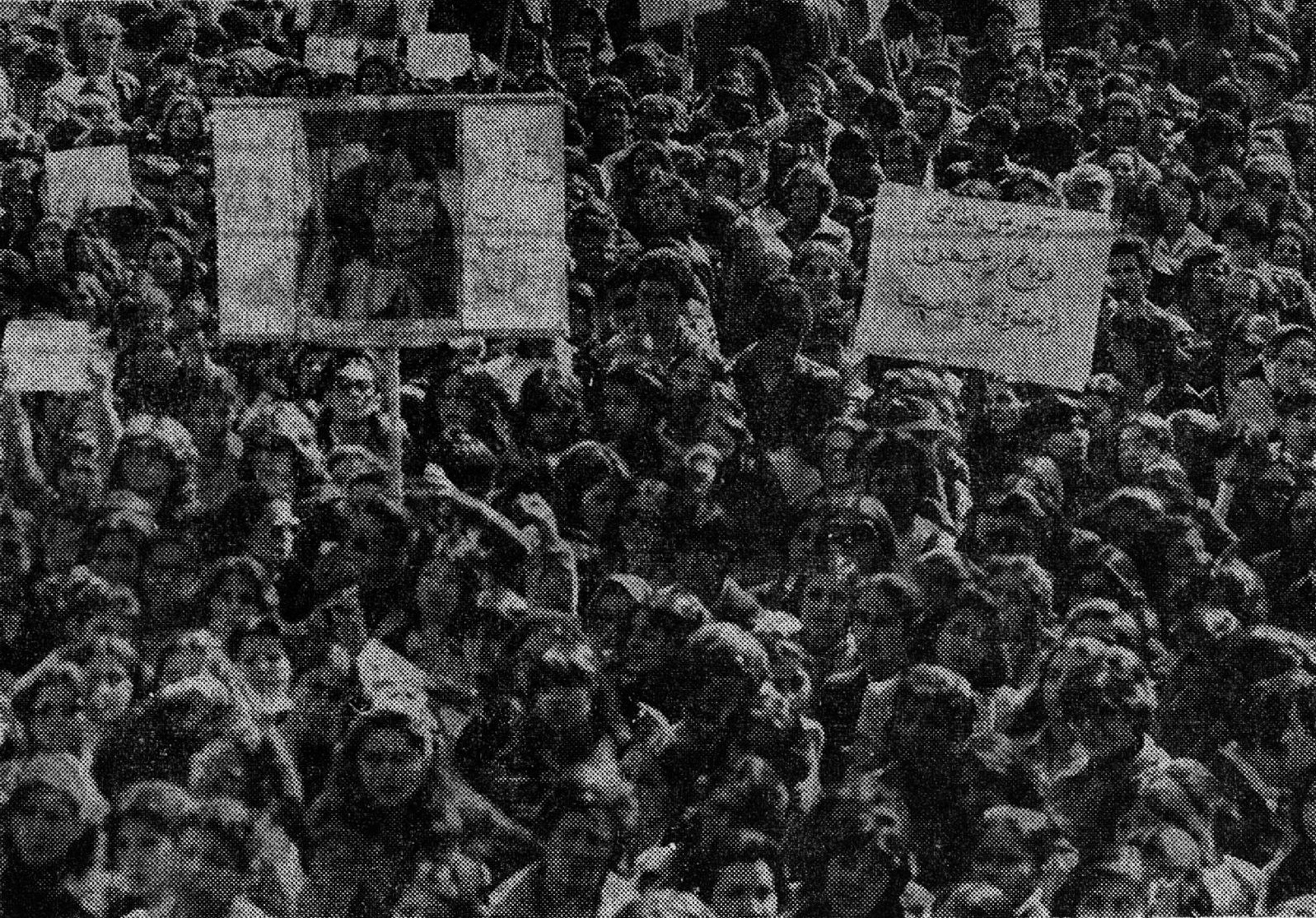 تظاهرات ۲۱ اسفند ۱۳۵۷ زنان در تهران.